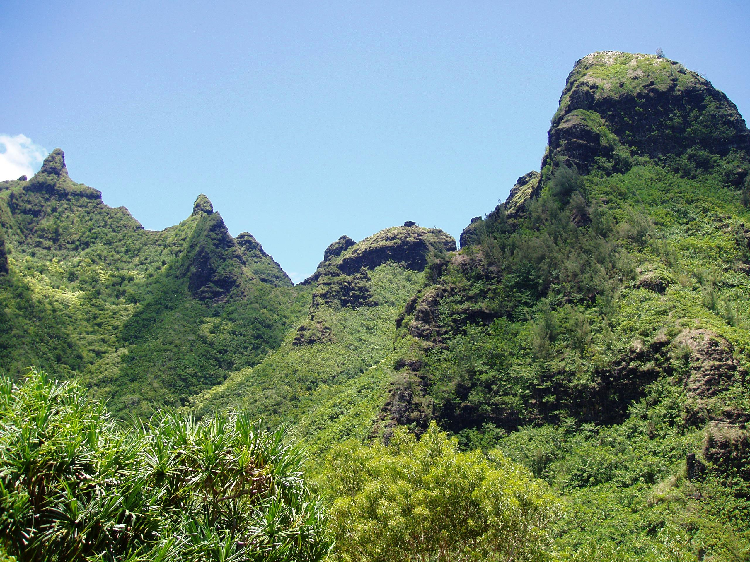 Makana Mountain ridge from Limahuli Garden and Preserve, Kauai, Hawaii.